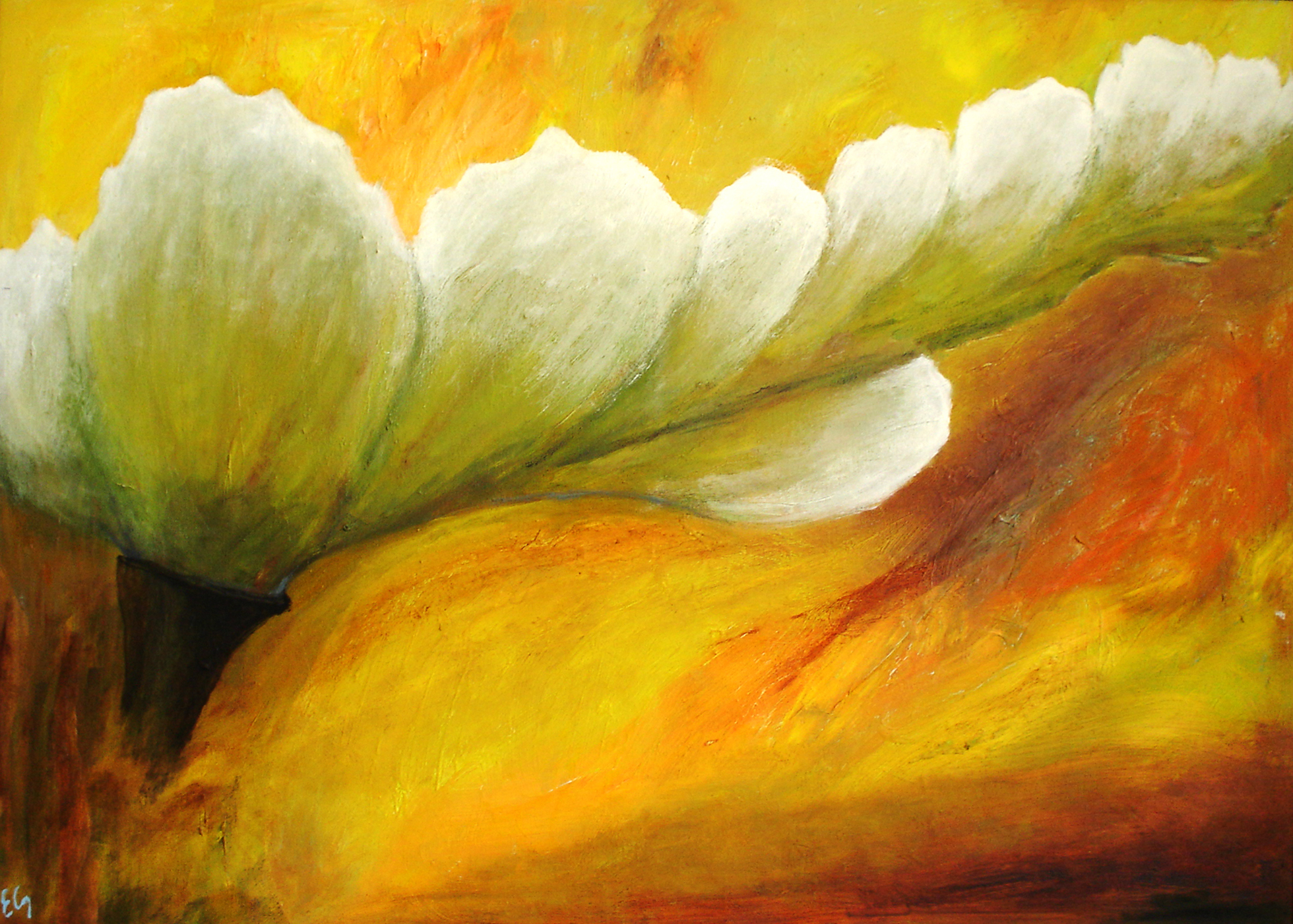 Pintura de Eugenio Cruz Vargas (1923-2014). Técnica: óleo sobre tela. Tema: abstracción total. Ya no hay elementos referenciales. Medidas: 65 x 80 cm. Autor de la fotografía: José Cruz. La publicación de esta fotografía en internet está consentida por el propietario titular de los derechos de autor de la misma bajo las condiciones que establece la Licencia de Uso Creative Commons, Atribución-Compartigual 3.0 Unported (CC BY-SA 3.0).